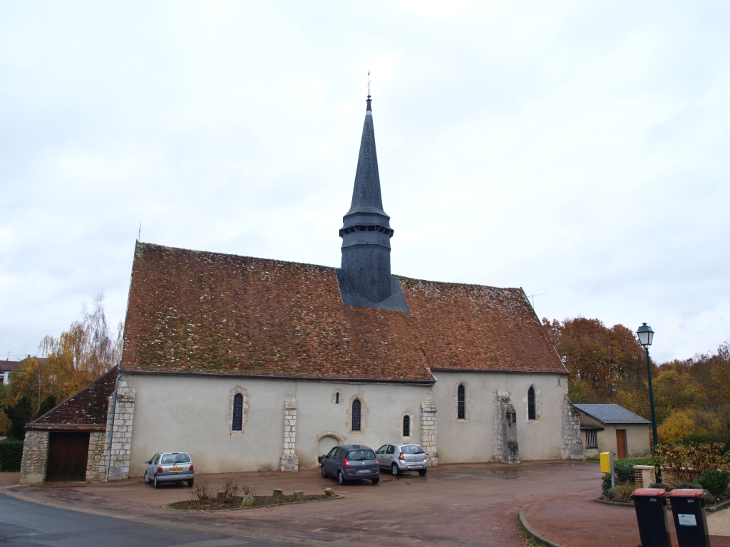 La Selle-en-Hermoy (Loiret, France) ; église.